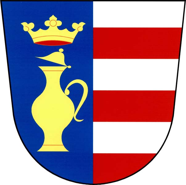 Znak obce Černíkov